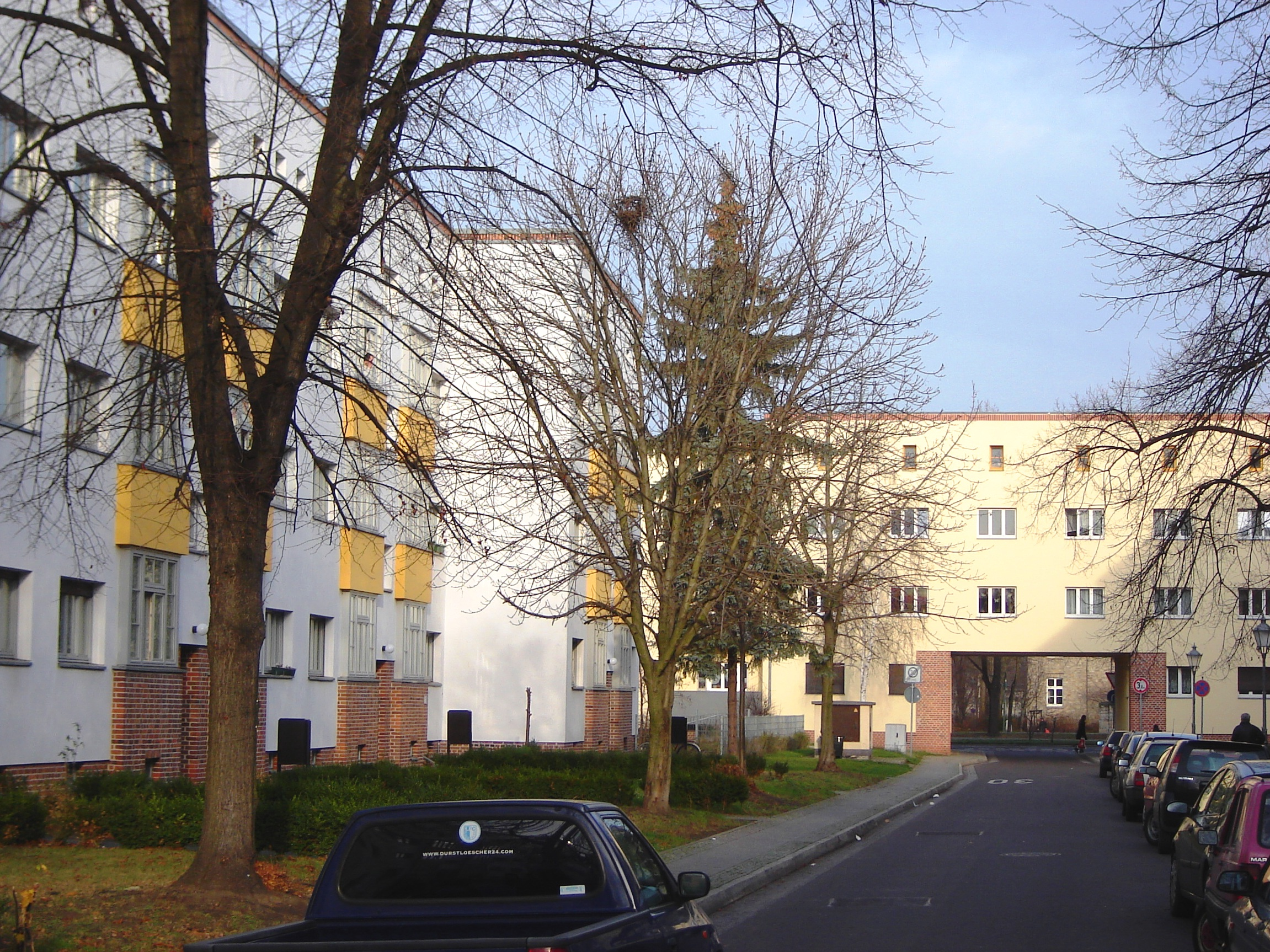 Bauhausstrasse, Magdeburg (Germany)